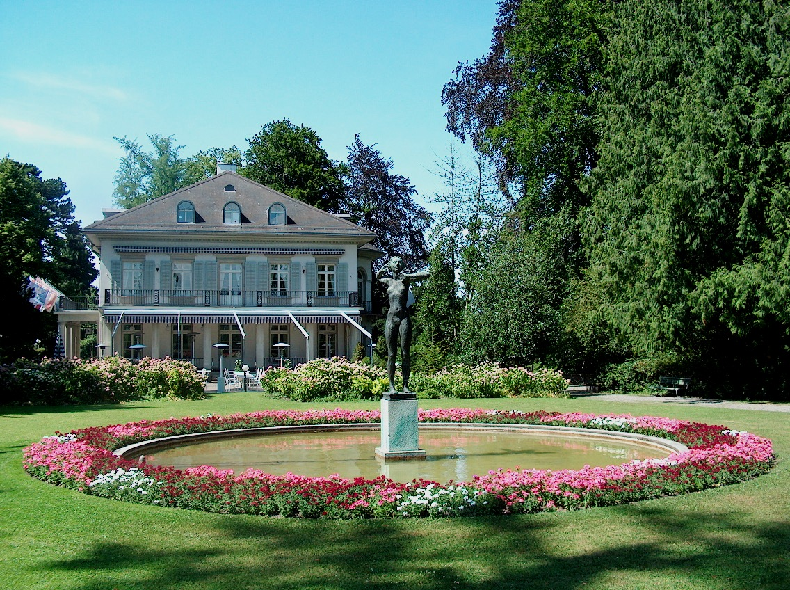 Belvoirpark